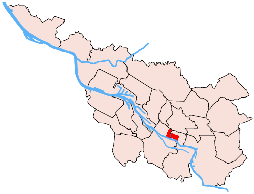 ungefähre Lage des Viertels in Bremen